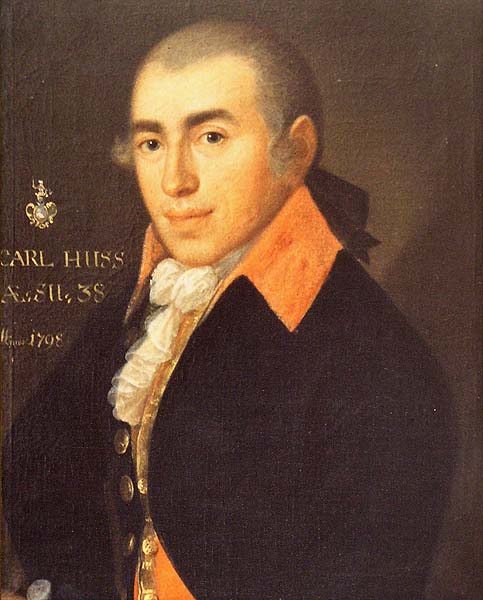 Karel Huss mistr popravčí